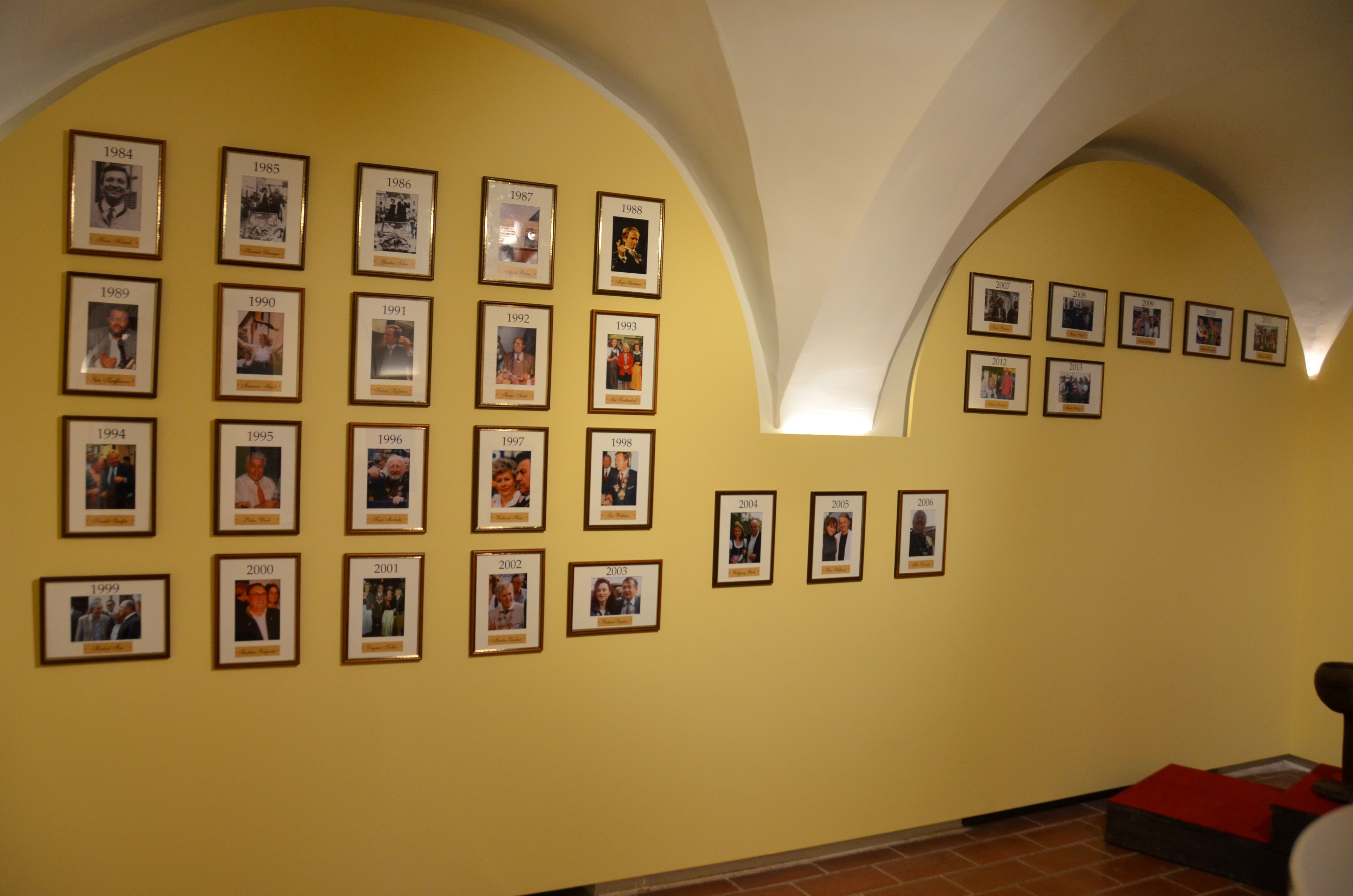 Galerie mit Portraits aller Winzerfestpräsidenten seit 1984 im Winzerfestraum des Vinoversum